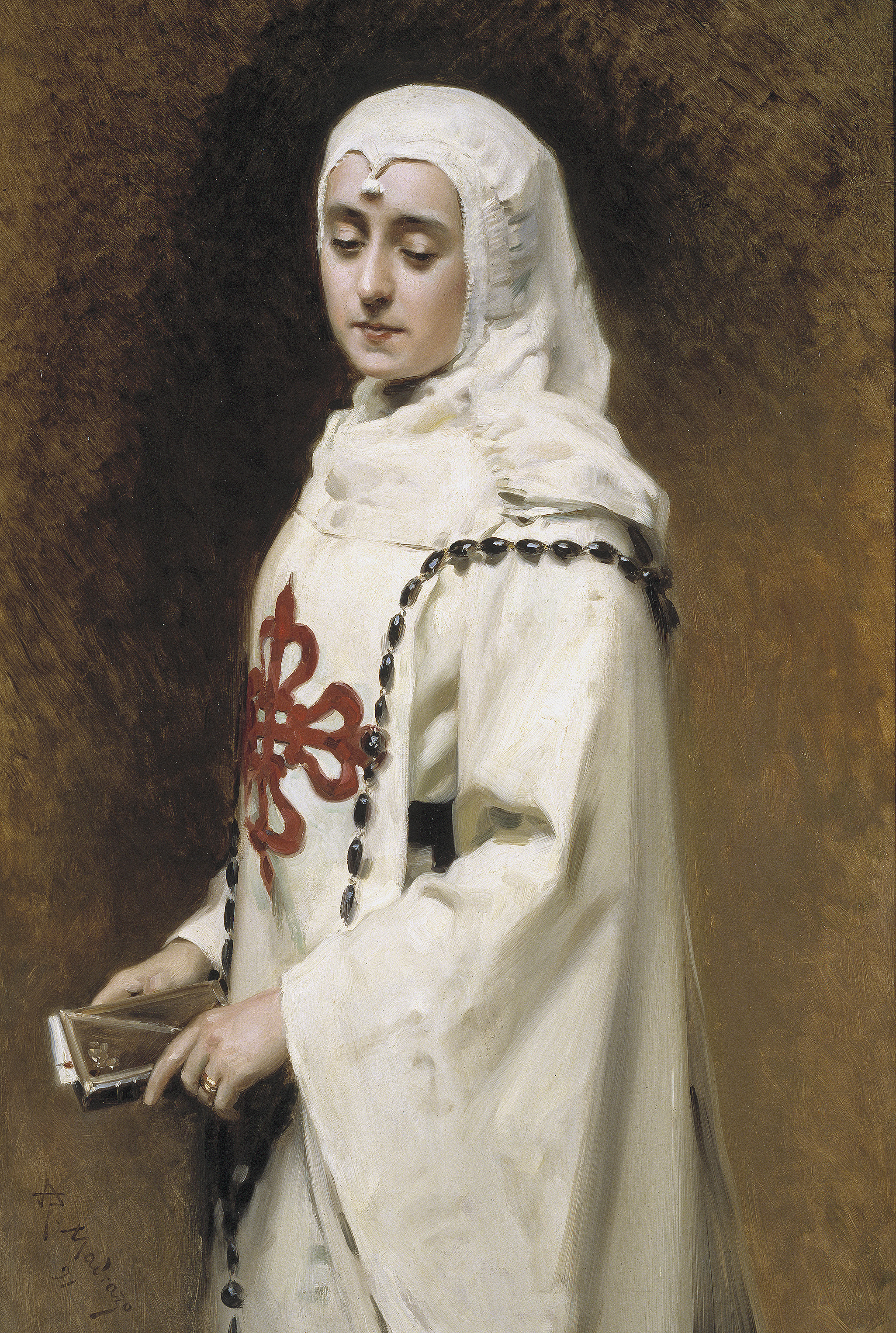 La obra representa a la actriz española María Guerrero (1867-1928) en el papel de Doña Inés, que es la protagonista femenina de la obra de Don Juan Tenorio, de José de Zorrilla.